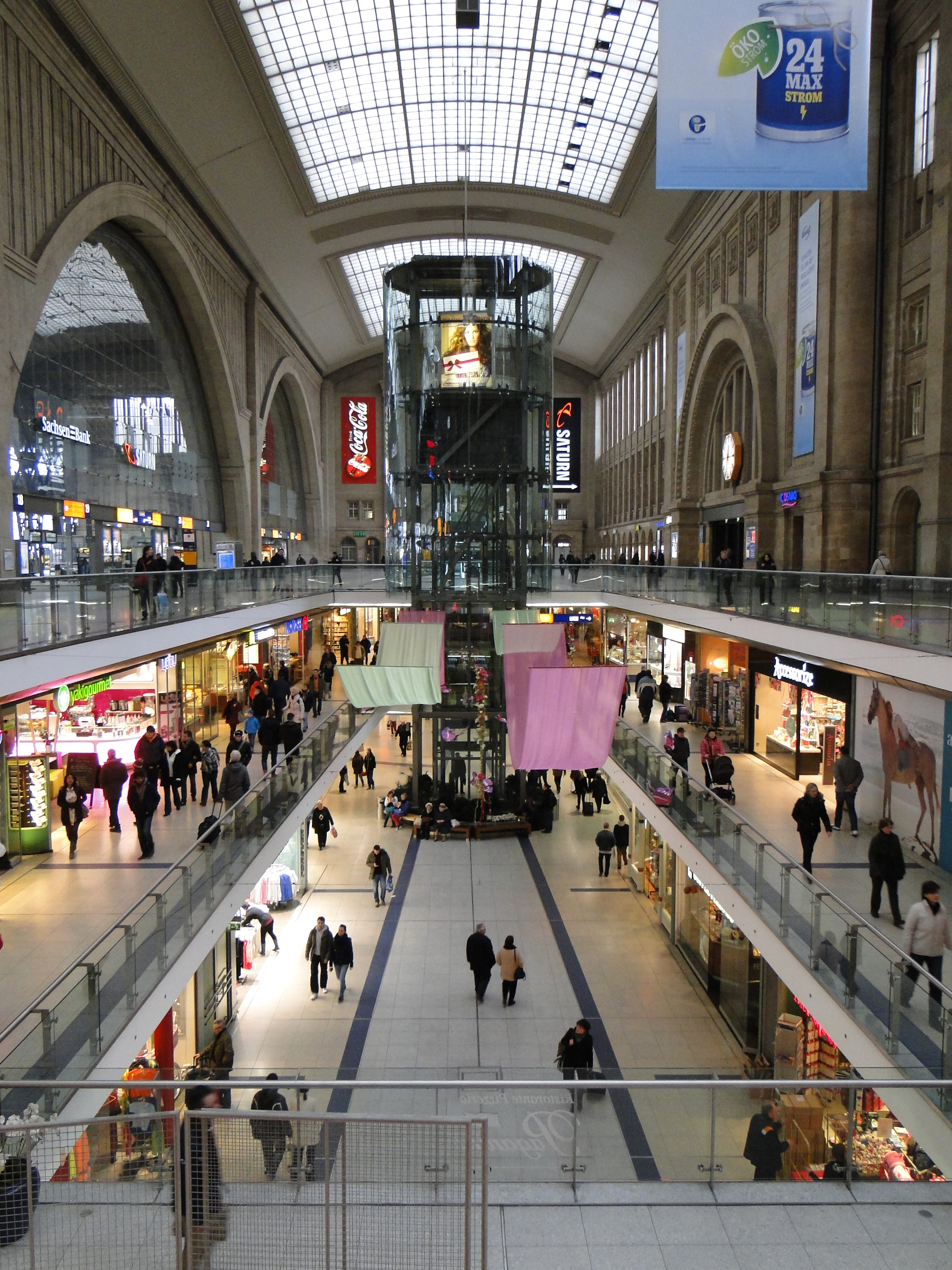 Leipzig Hbf, April 2013